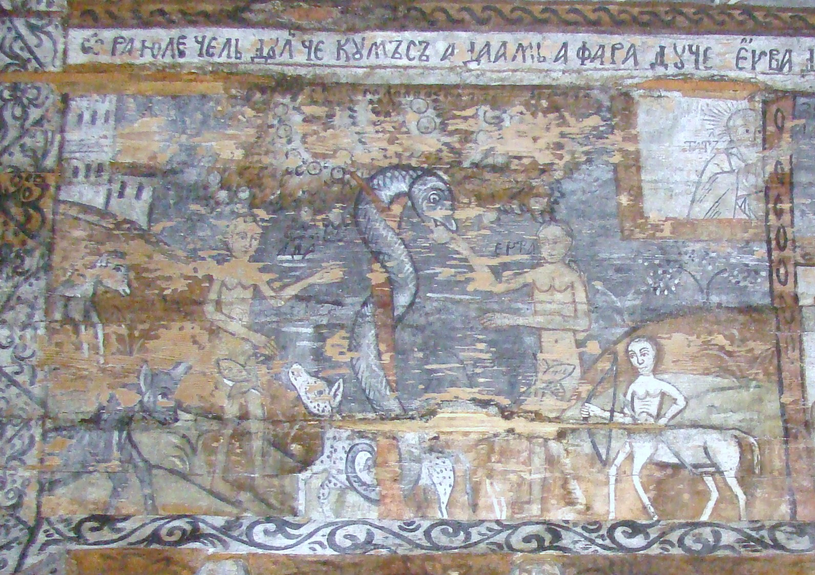 Biserica de lemn "Naşterea Maicii Domnului", sat IEUD